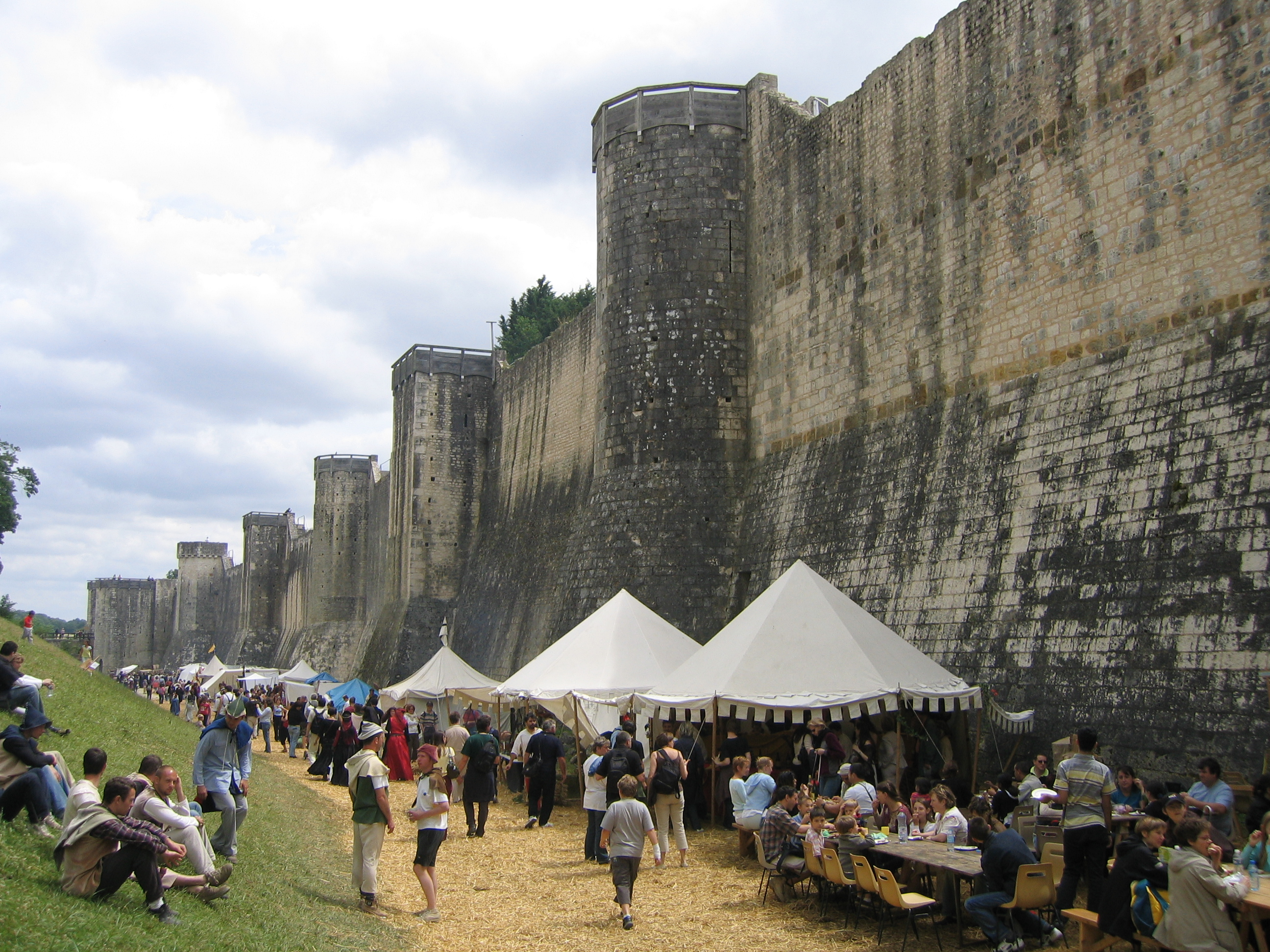 Vue d'ensemble de la fête dans les douves